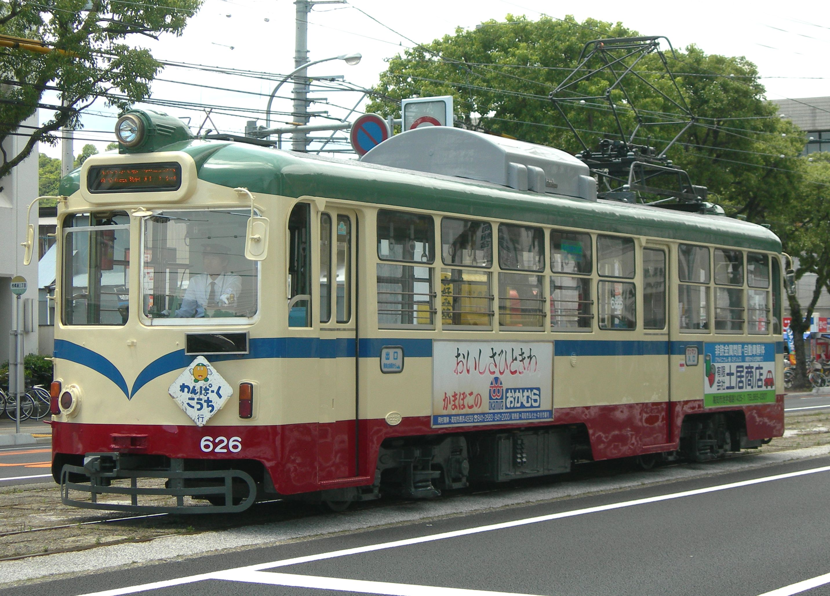 土佐電気鉄道600形電車 桟橋通四丁目電停付近で撮影